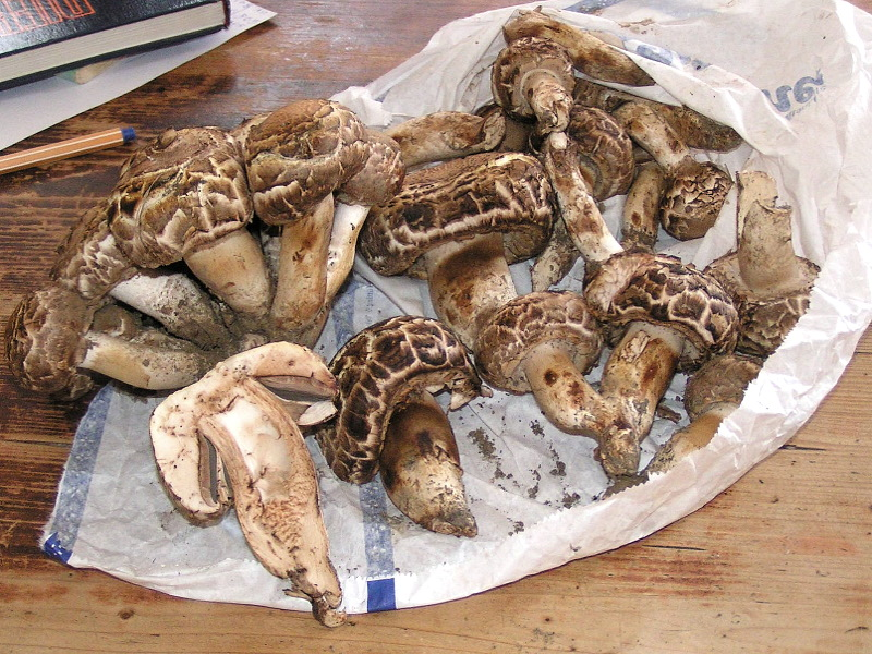 Agaricus vaporarius - Agaricaceae